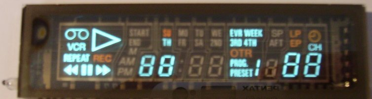 Photo personnelle. Pour voir ce composant avec plus de détails voir